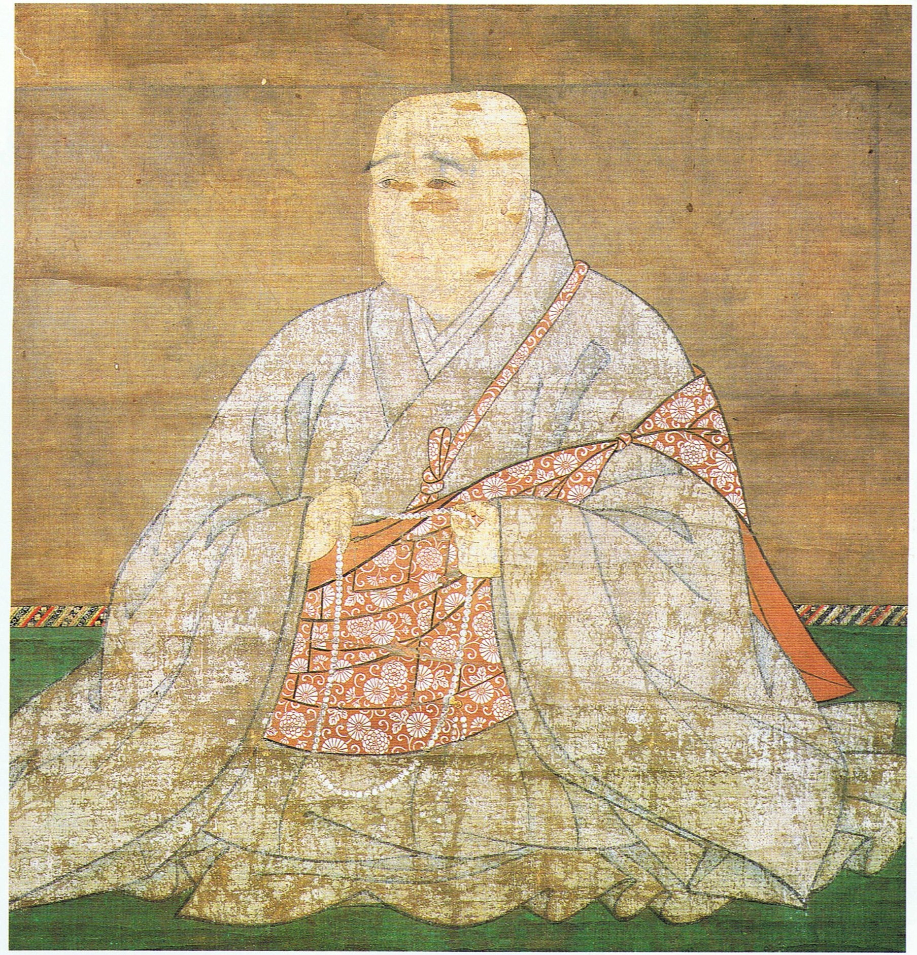 後白河法皇像（神護寺所蔵）